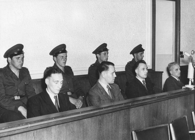 This description has been identified as biased or incorrect: SED biasProzess gegen Aufständische vom 17. Juni 1953 Zentralbild/Junge, 11.6.1954 Rädelsführer des 17. Juni vor dem Obersten Gericht Ein Prozess gegen vier Agenten westlicher Spionage- und Terrororganisationen, die als Rädelsführer und Anstifter an der jahrelangen Vorbereitung und der Auslösung des faschistischen Putschversuches vom 17. Juni 1953 massgeblich mitgewirkt haben, begann am 10.6.1954 vor dem 1. Strafsenat des Obersten Gerichts der Deutschen Demokratischen Republik. UBz: Am zweiten Verhandlungstag des Prozesses. (v.l.n.r.) Die Angeklagten Horst Gassa, Hans Füldner, Werner Mangelsdorf und der Hauptangeklagte Dr. Wolfgang Silgradt. Abgebildete Personen: Gassa, Horst: Angeklagt wegen Teilnahme am Aufstand 17. Juni 1953, DDR Mangelsdorf, Werner: Prozeß 17.6.1953 vor dem Obersten Gericht der DDR, Bundesrepublik Deutschland Silgradt, Wolfgang Dr.: 1954 Prozeß vor 1. Strafsenat des Obersten Gerichtes der DDR, Bundesrepublik Deutschland